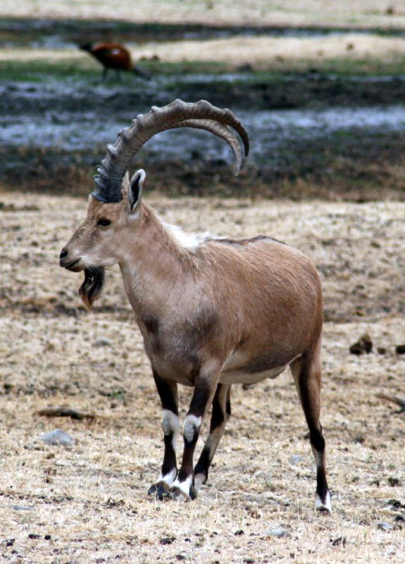 A male Nubian Ibex